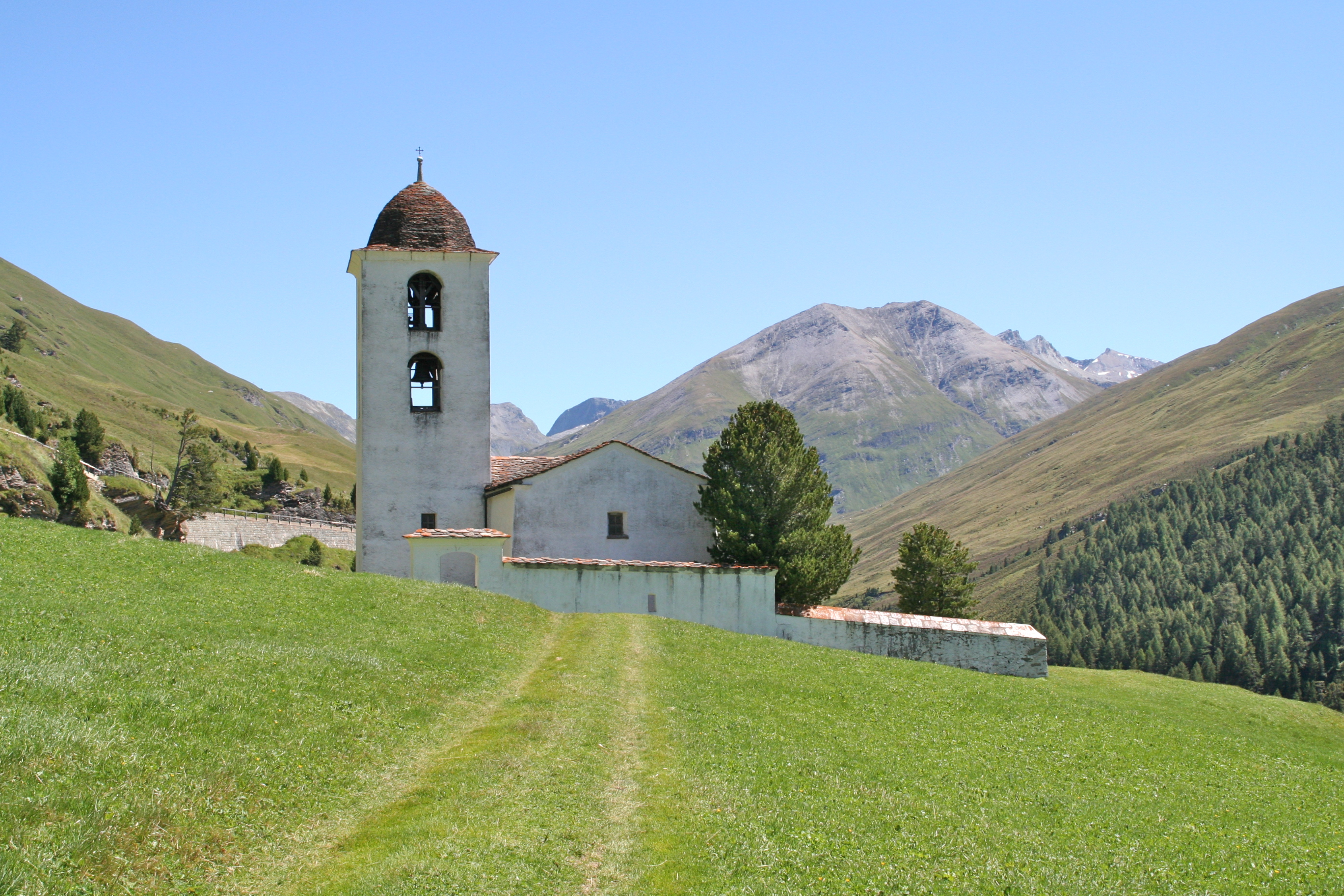 Ansicht von NW